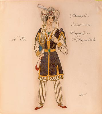 Эскиз к постановке драмы М. Лермонтова «Маскарад»